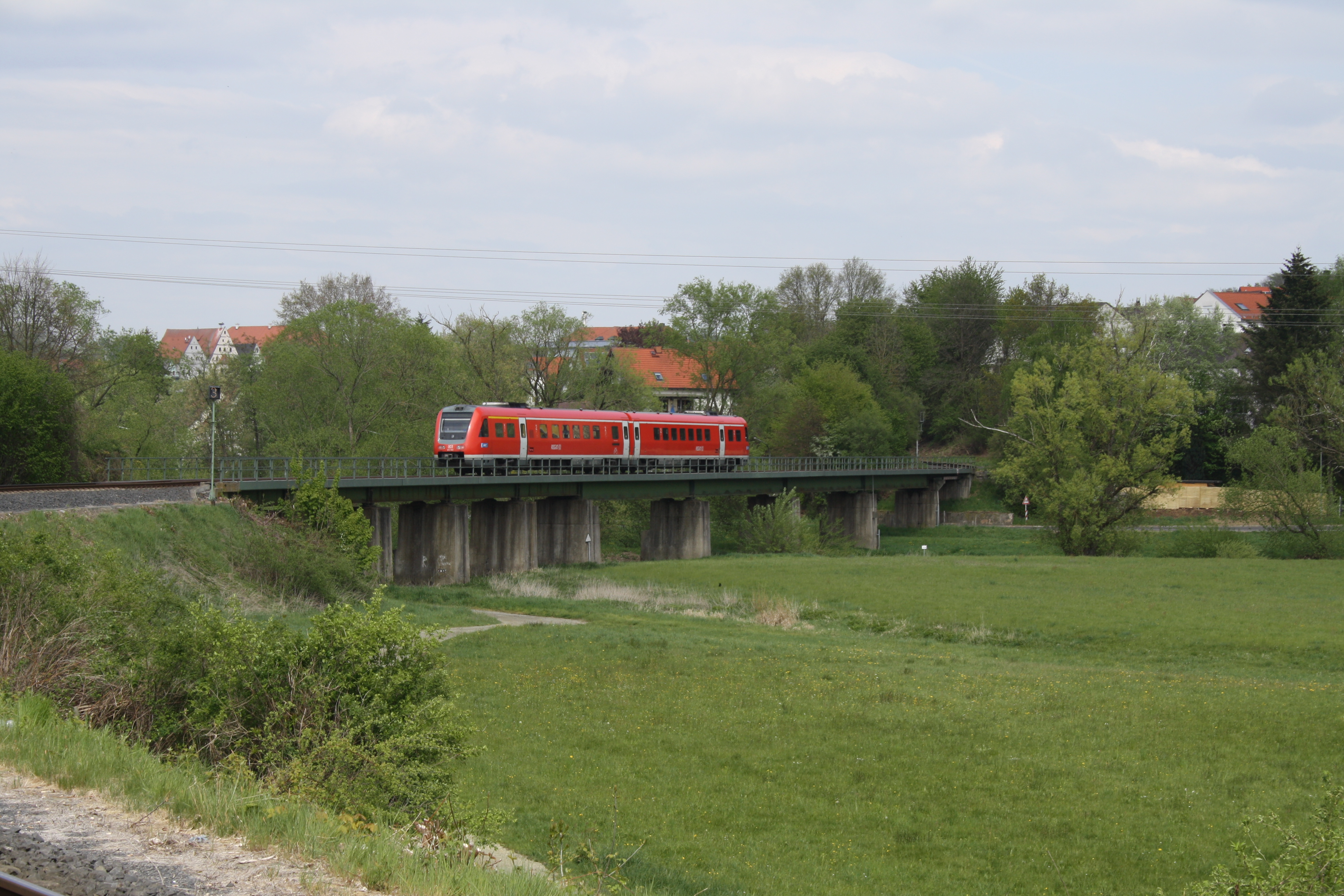 Bahnbrücke Neustadt über die Waldnaab